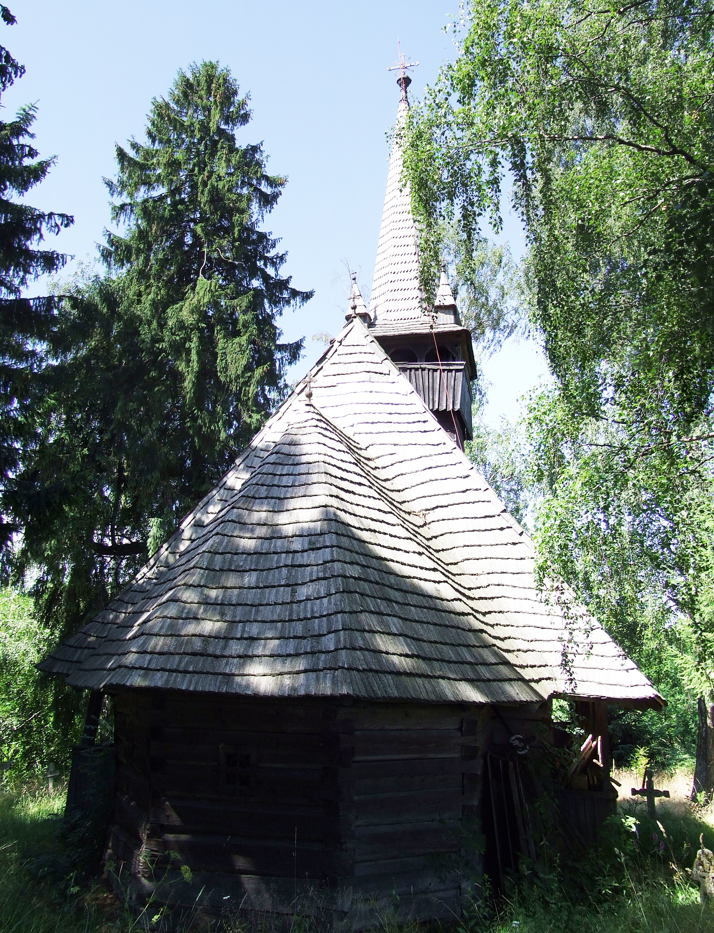 Biserica de lemn din Dângău Mic